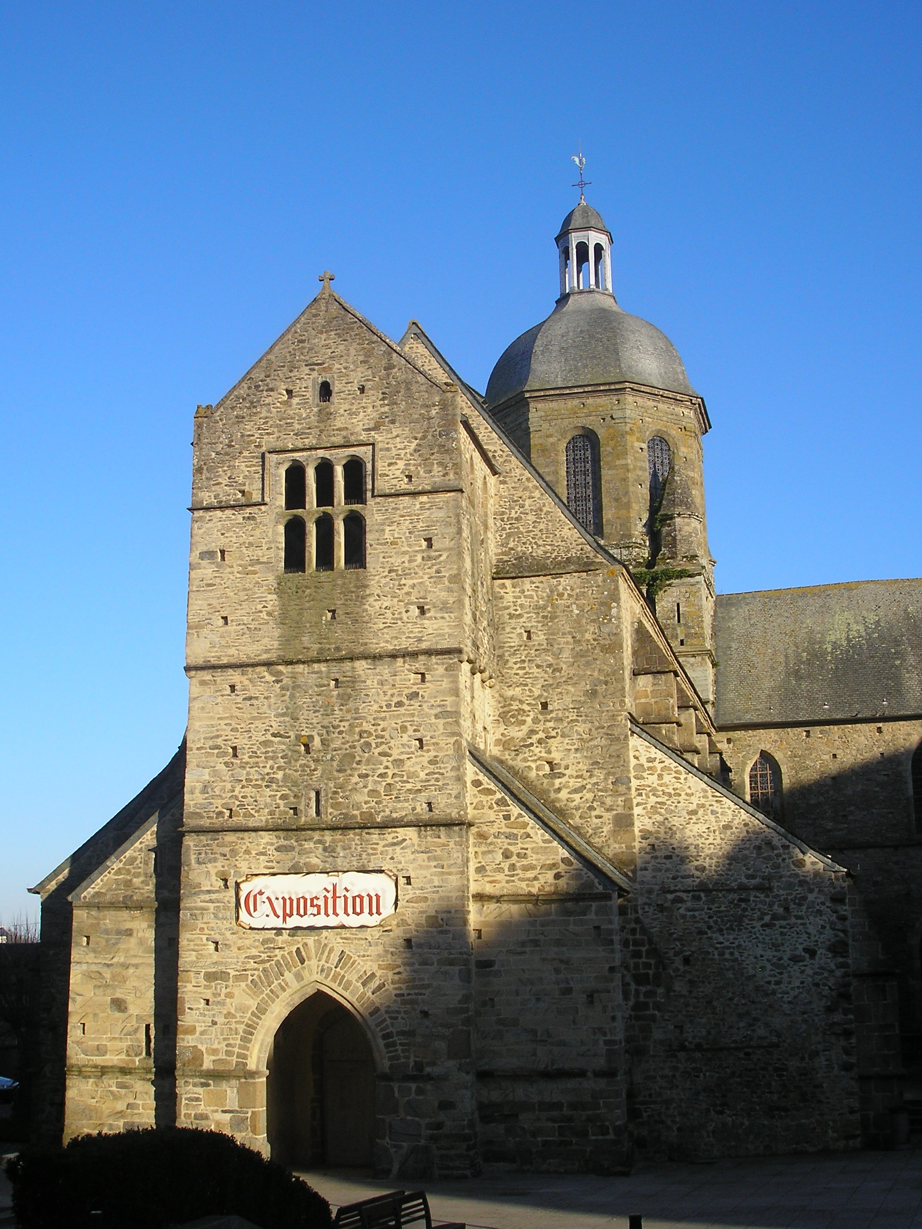 Coutances (Normandie, France). L'église Saint-Nicolas.